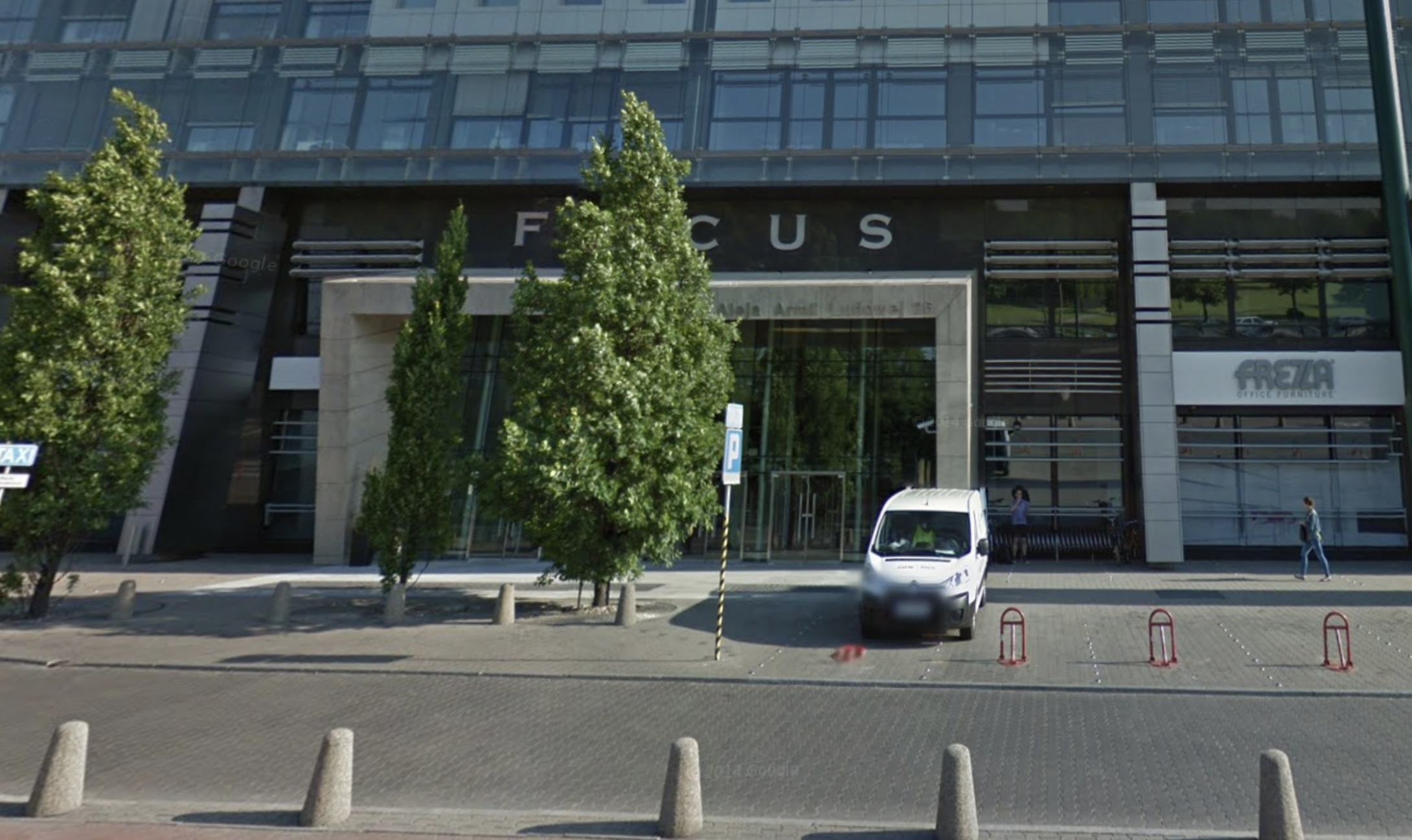 Norges nye ambassade i Warsawa